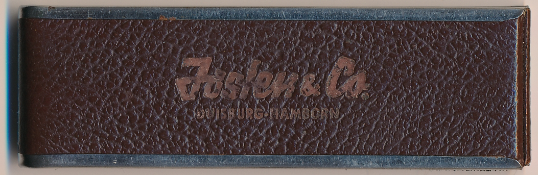 Taschenkleiderbürste eingeschoben